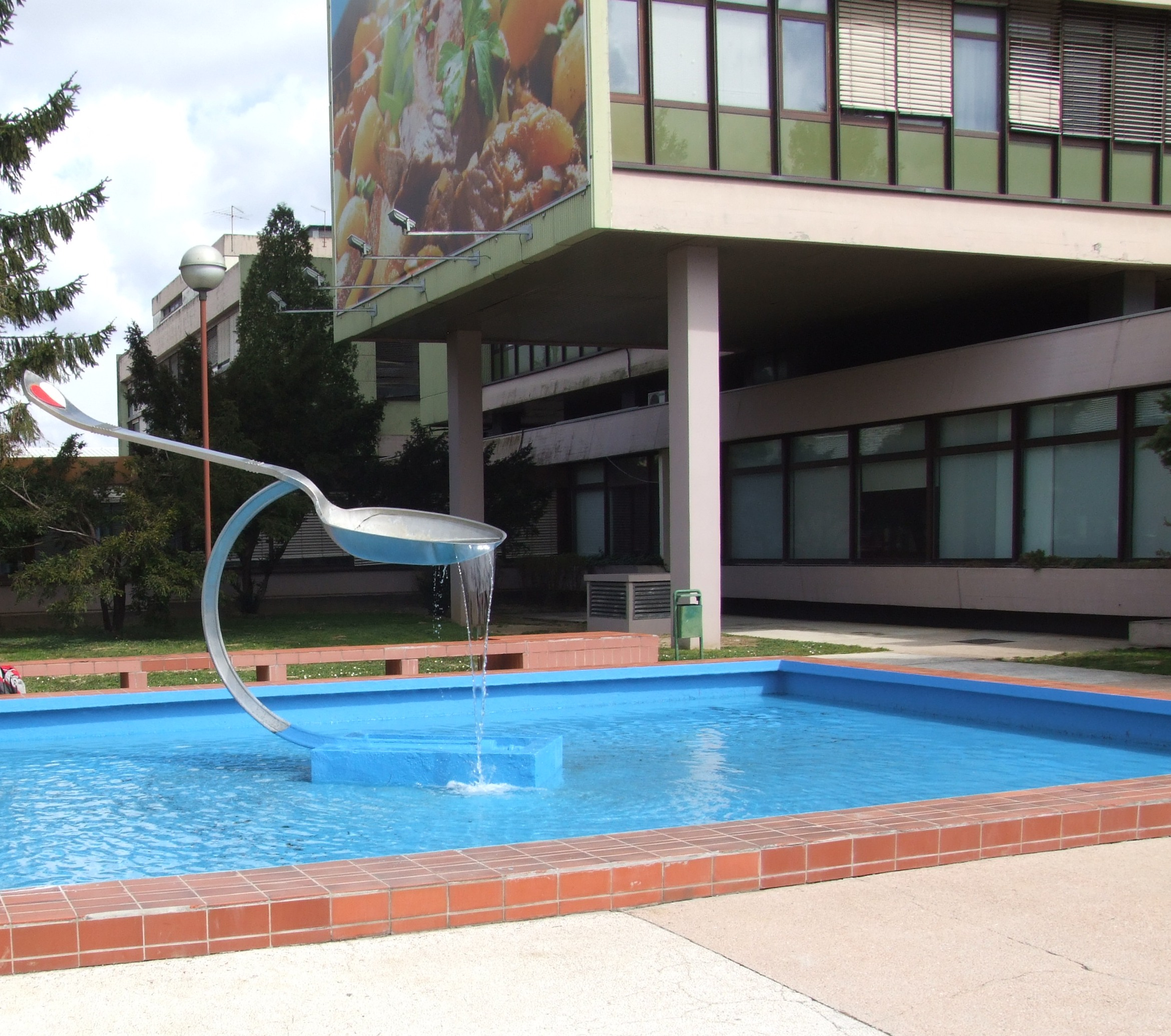 A Podravka gyár irodaháza előtti szimbilikus szökőkút, Kapronca